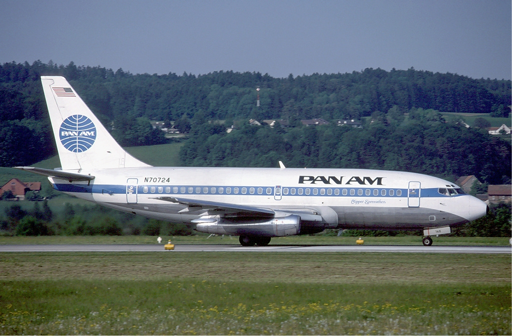 Boeing 737-200 at Zurich Airport